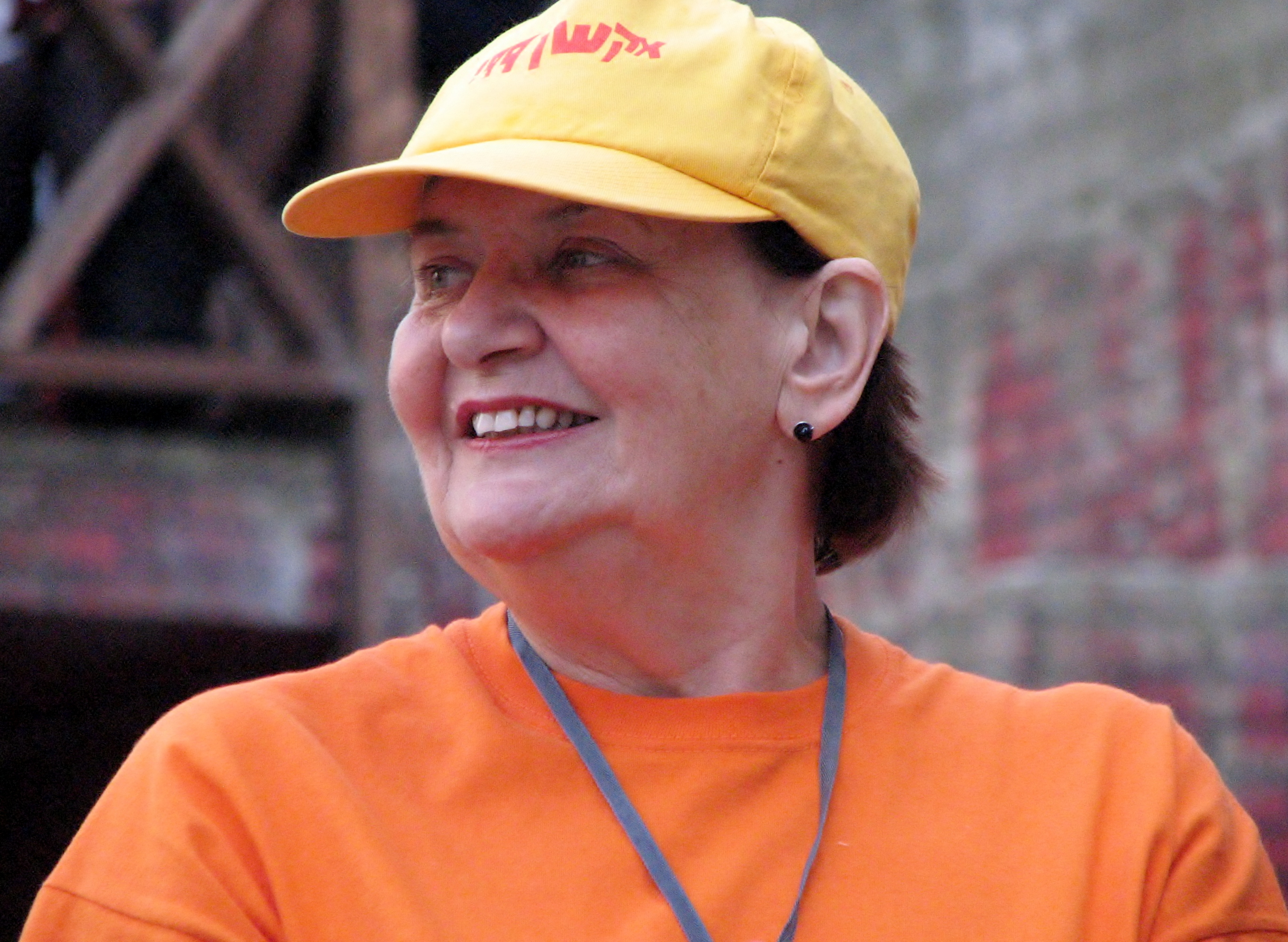 Helene Vannari Tallinna Linnateatri 48. hooaja avamisel